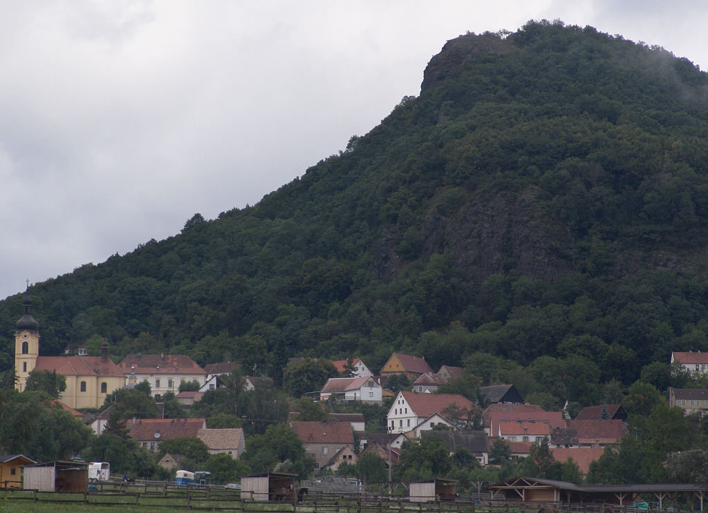 Pohled na Třebušín s vrchem Kalich v pozadí. (foto z roku 2005)